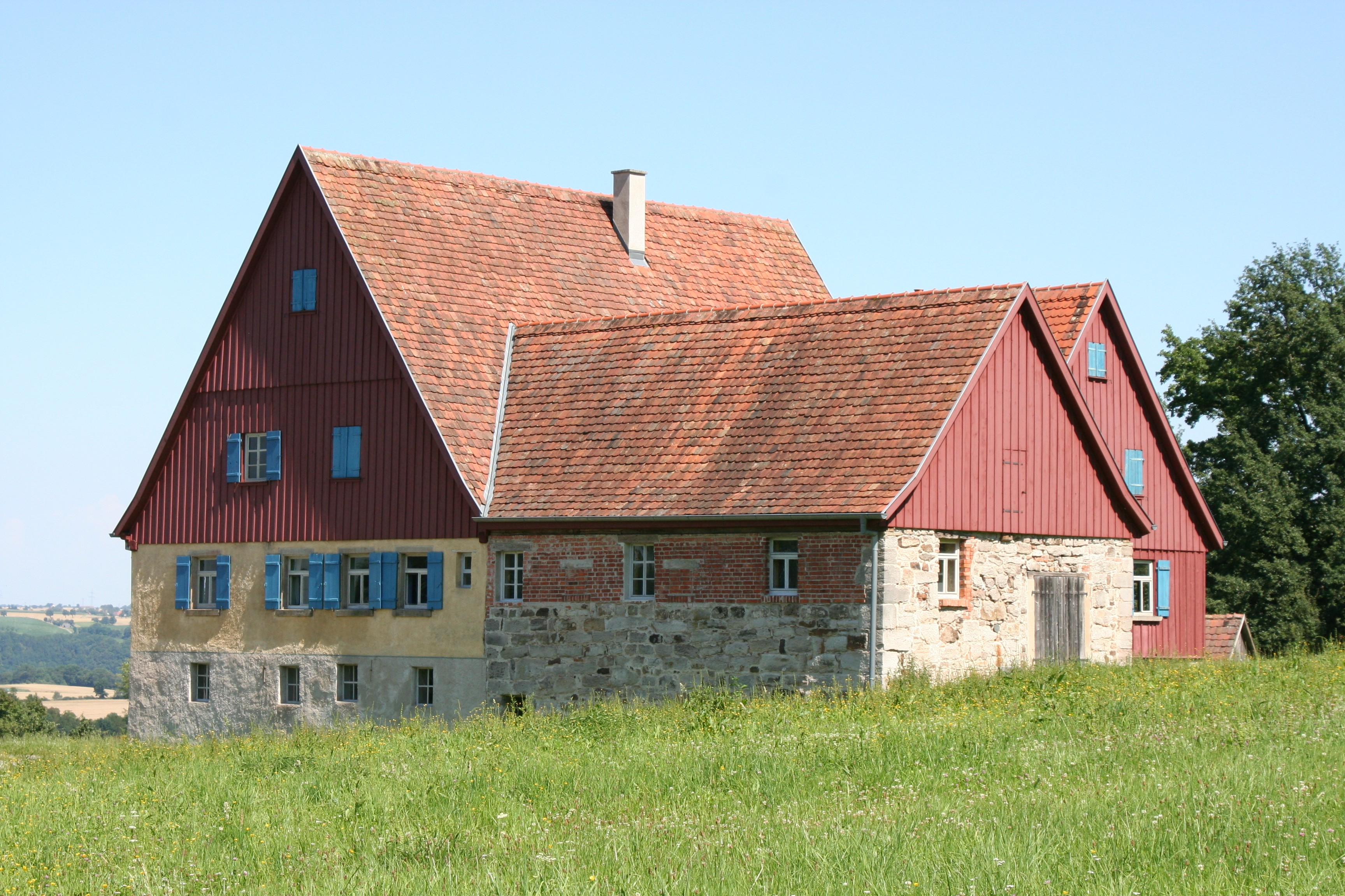 Wohn-Stall-Haus (Unterer Käshof) aus Käsbach im Freilandmuseum Wackershofen